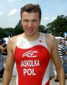 Marek Jaskółka